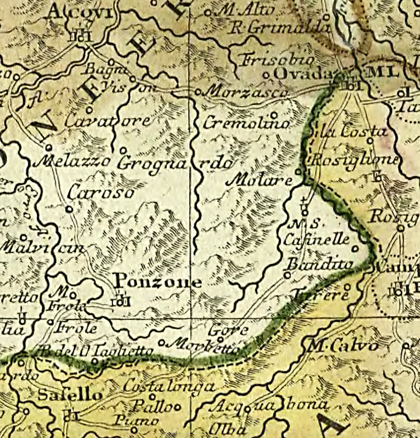 Mappa di Tobias Mayer (1723 – 1762), realizzata nel 1749, relativa ai territori della Repubblica di Genova. Ritaglio su alcuni comuni del basso Piemonte, per evidenziare la viabilità che univa Ovada, Sassello, Ponzone e Acqui Terme. This file has been extracted from another file: WA51 44920 PANB1644-44-r1749 Mappa-Genuensis.png